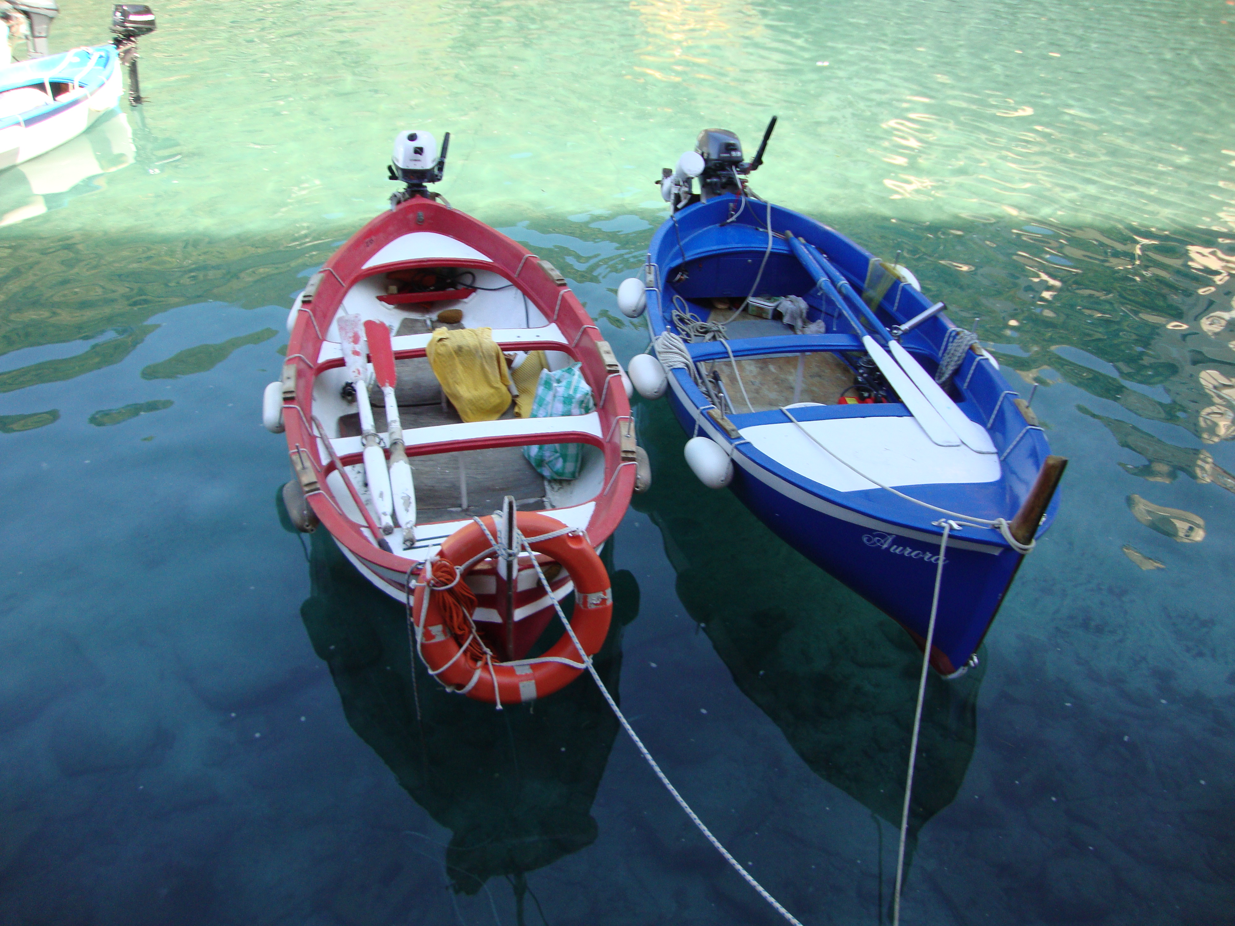 Holzboote